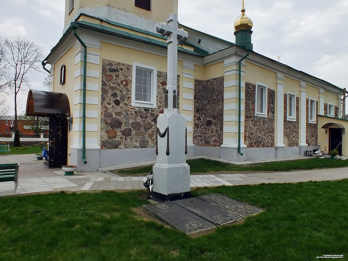 Астрамечава. Прыцаркоўны крыж-помнік, пастаўлены ў 18 ст у гонар мясцовай шляхты